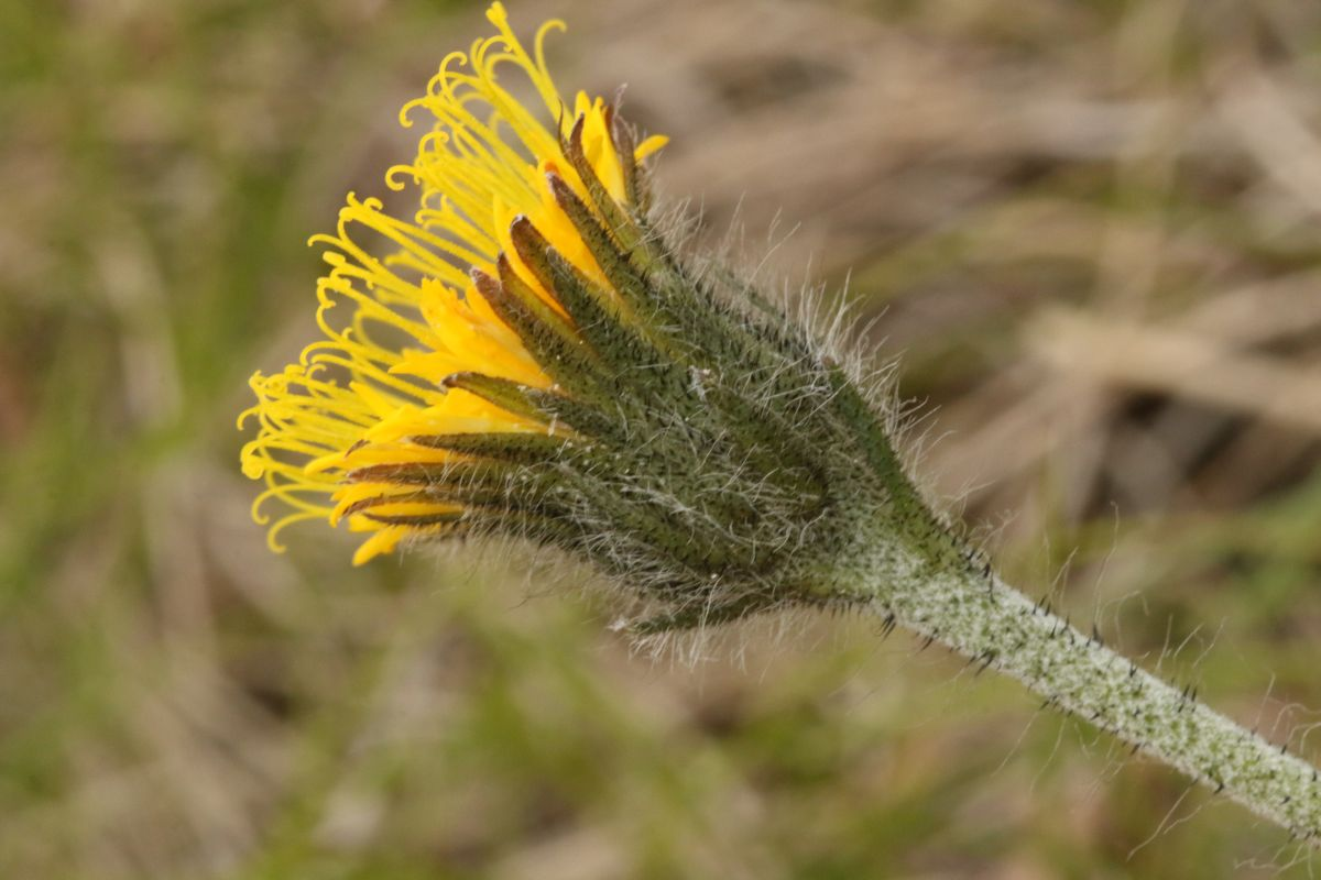 Hieracium rohlenae (H. fritzei group), Luční hora, Krkonoše mountains, Czech republic (endemic species of Krkonoše mountains)